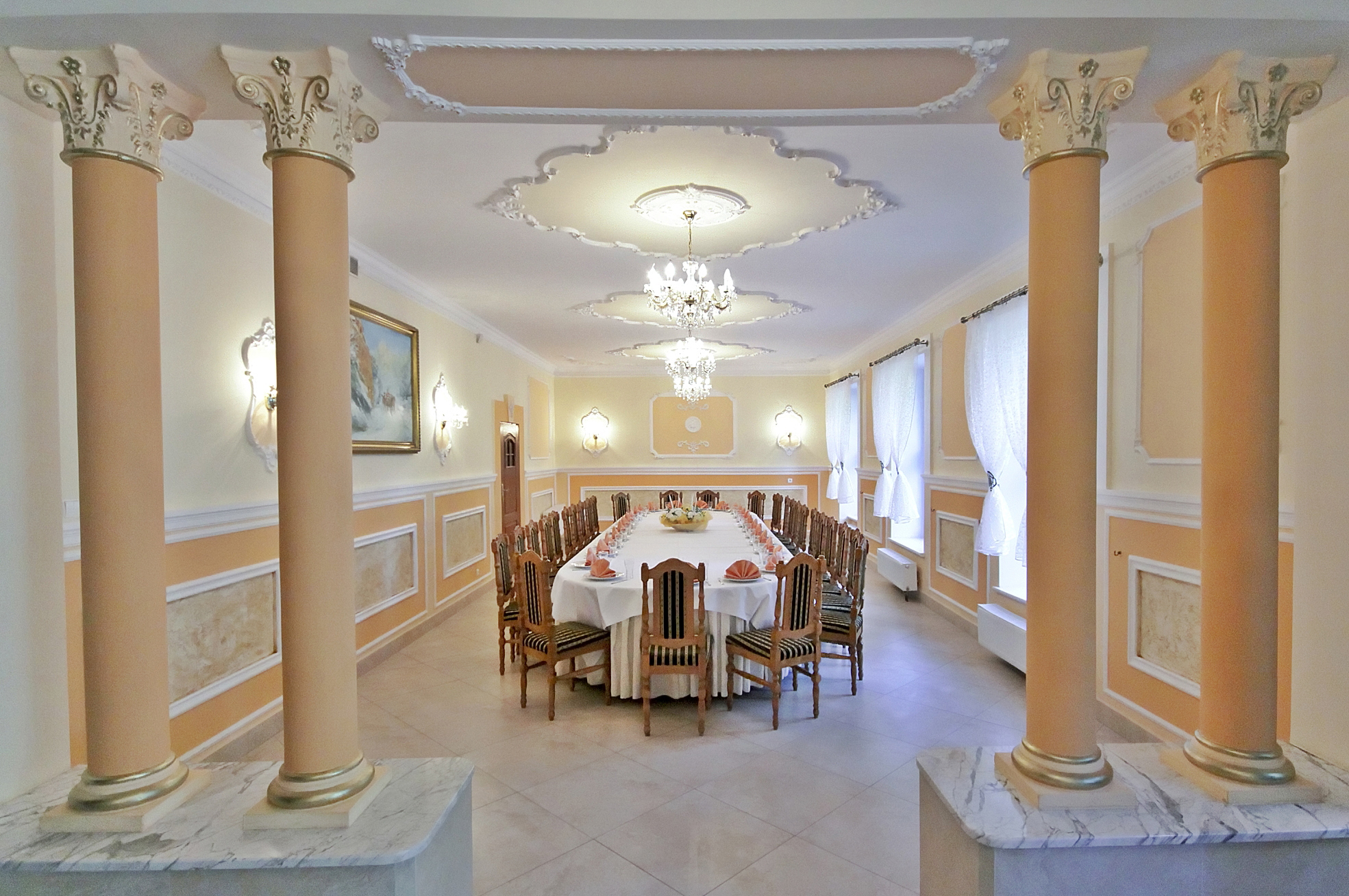 Wojnowice - pałac, jedna z pałacowych sal, aktualnie restauracja